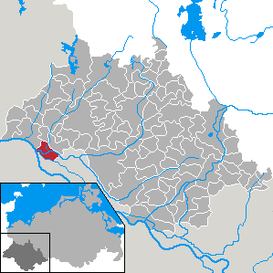 Teldau in Mecklenburg-Vorpommern - district Ludwigslust